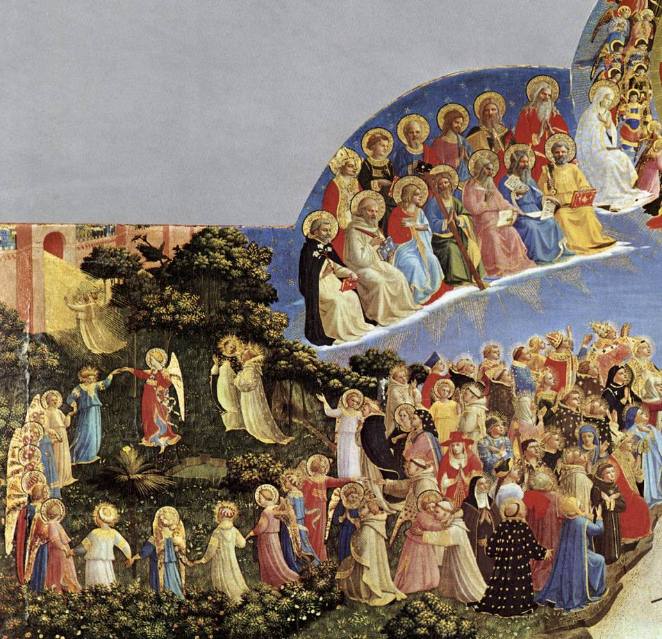 Last Judgement (detail) Tempera on wood